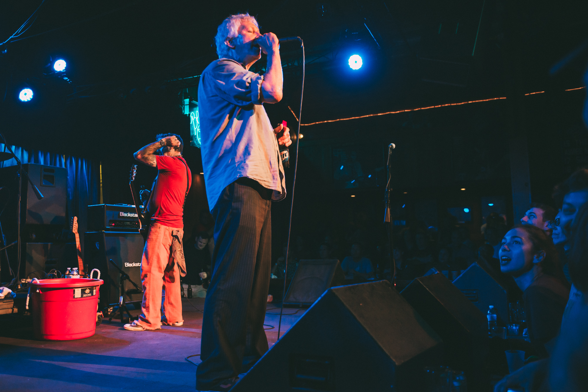 Guided by Voices tijdens een optreden in de Belly Up Tavern in San Diego (Californië)